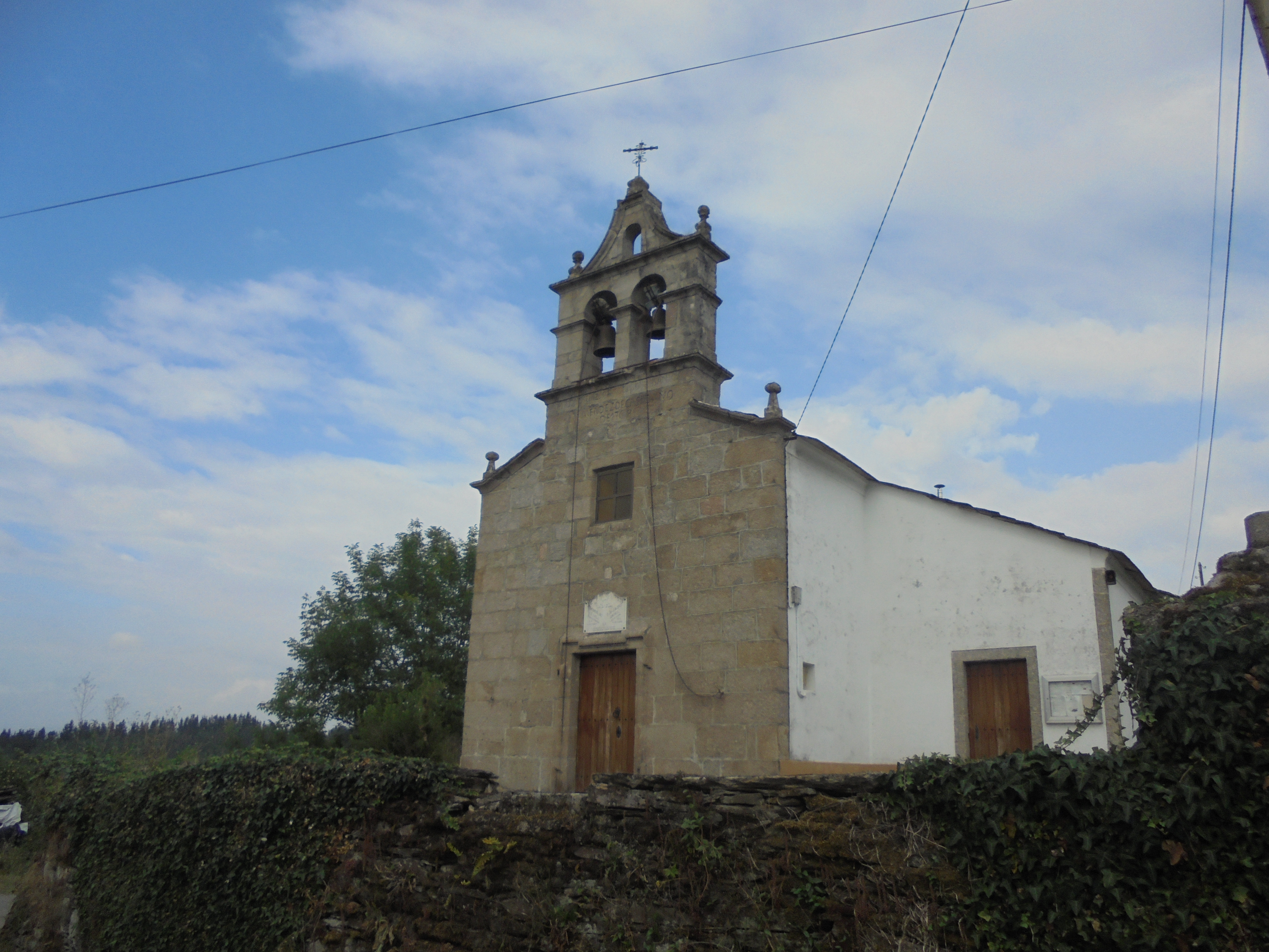 Igrexa de San Fiz de Paradela ( O Corgo)